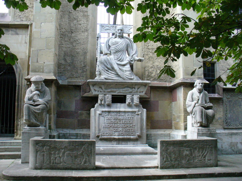 Stuttgart Hospitalkirche Reformationsdenkmal 1917